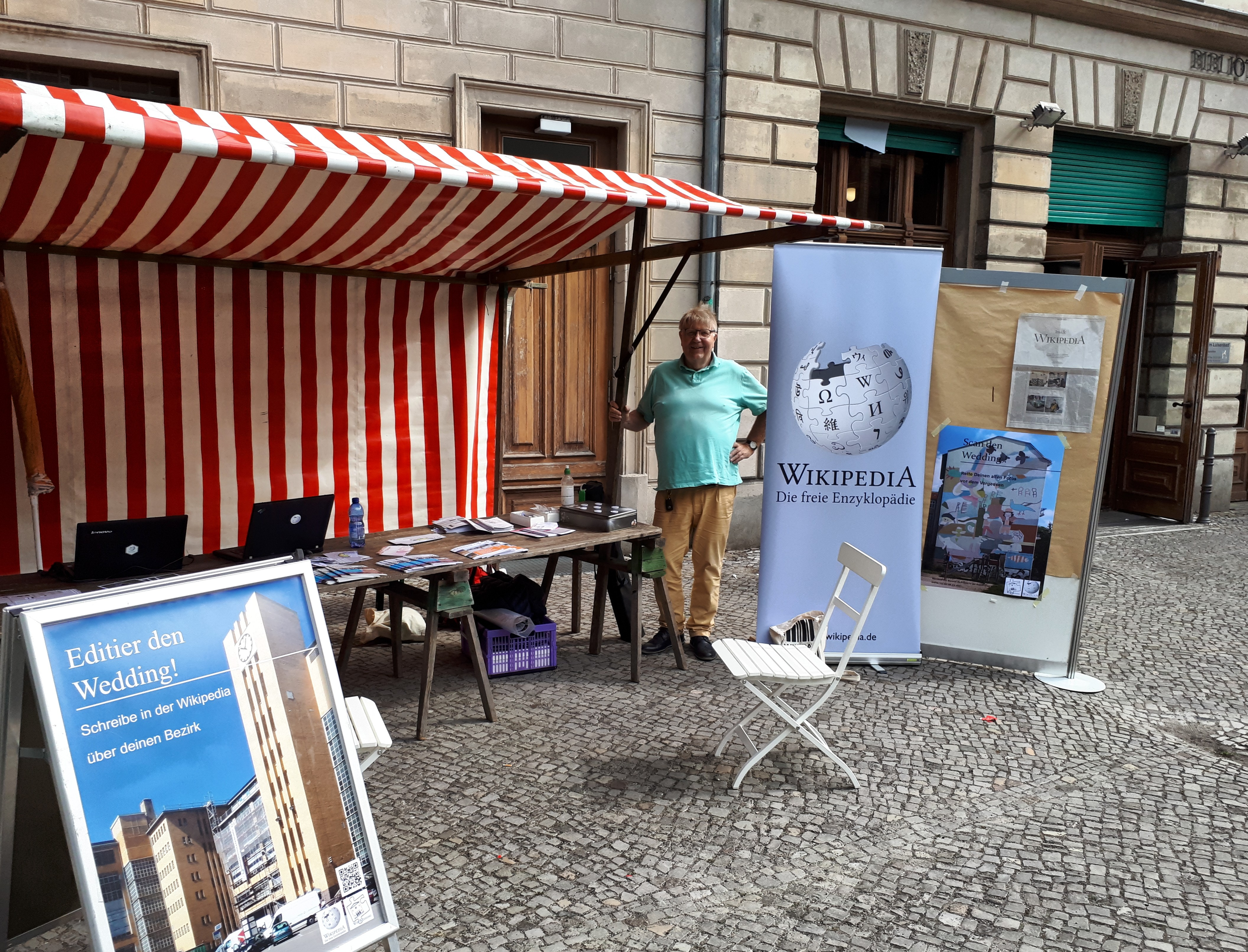 WikiWedding Pankeparcours 2018